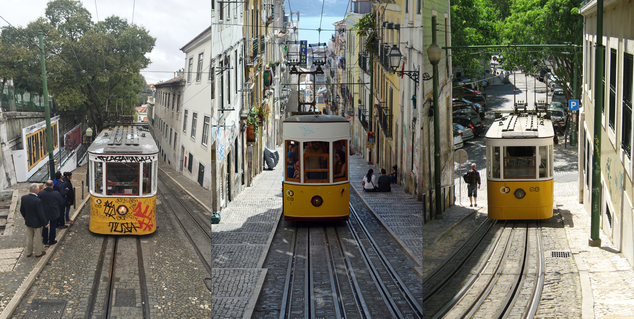 Vistas frontais de um dos carros de cada um dos três funiculares lisboetas.